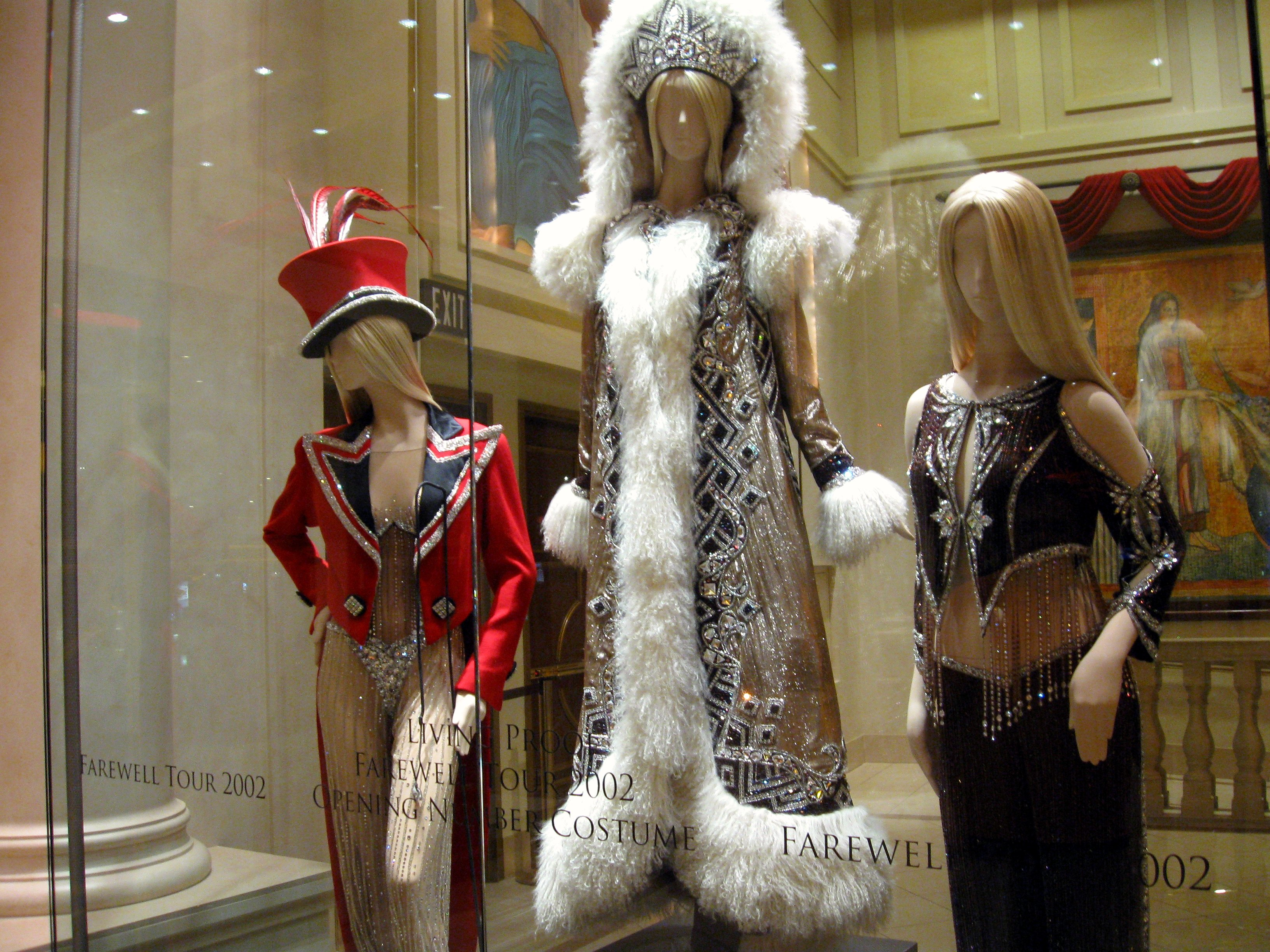 Vestuario de la gira Farewell Tour que utilizo Cher, exhibida en el coliseo Caesars Palace.